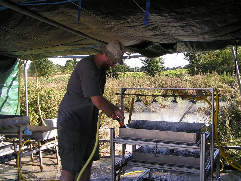 station de tamisage du site paléonthologique de Champblanc